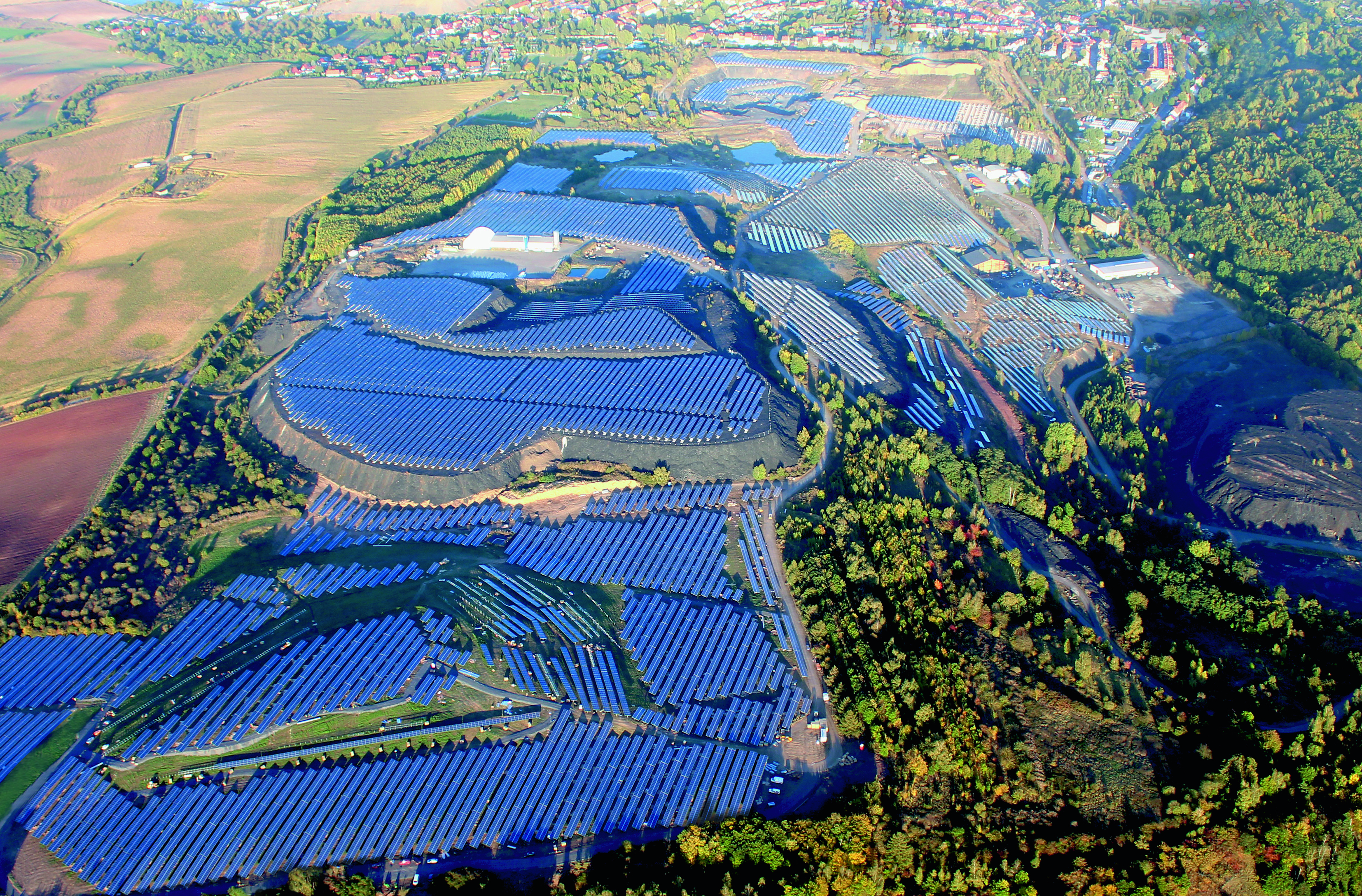 Krughütte Luftaufnahme Parabel